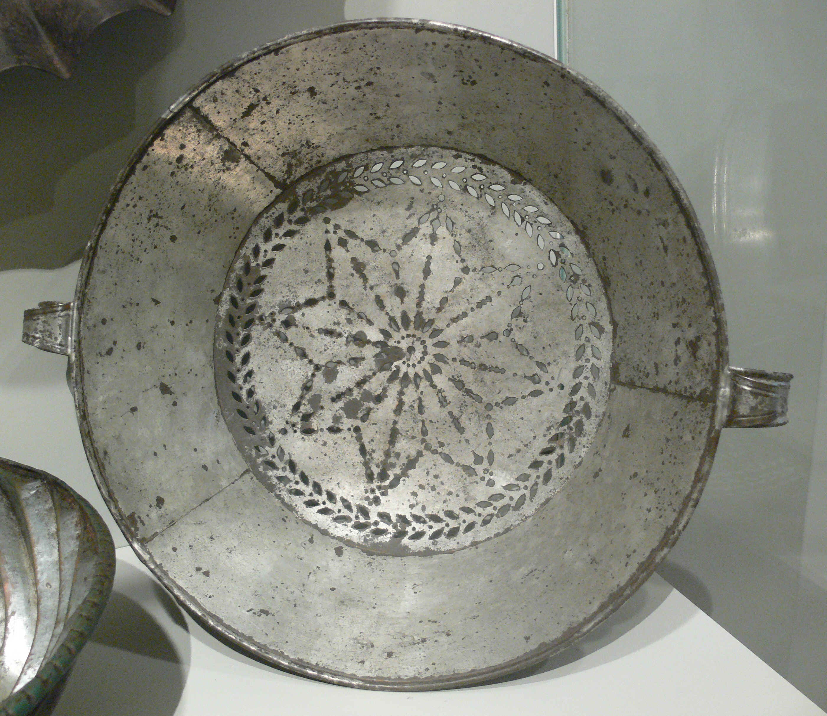 Abtropfsieb, Schwarzblech verzinnt, Württemberg 19./20. Jh. Landesmuseum Württemberg (Außenstelle Museum für Volkskultur in Württemberg, Waldenbuch) E. 5.2, Inv. Nr. VK 1988/248